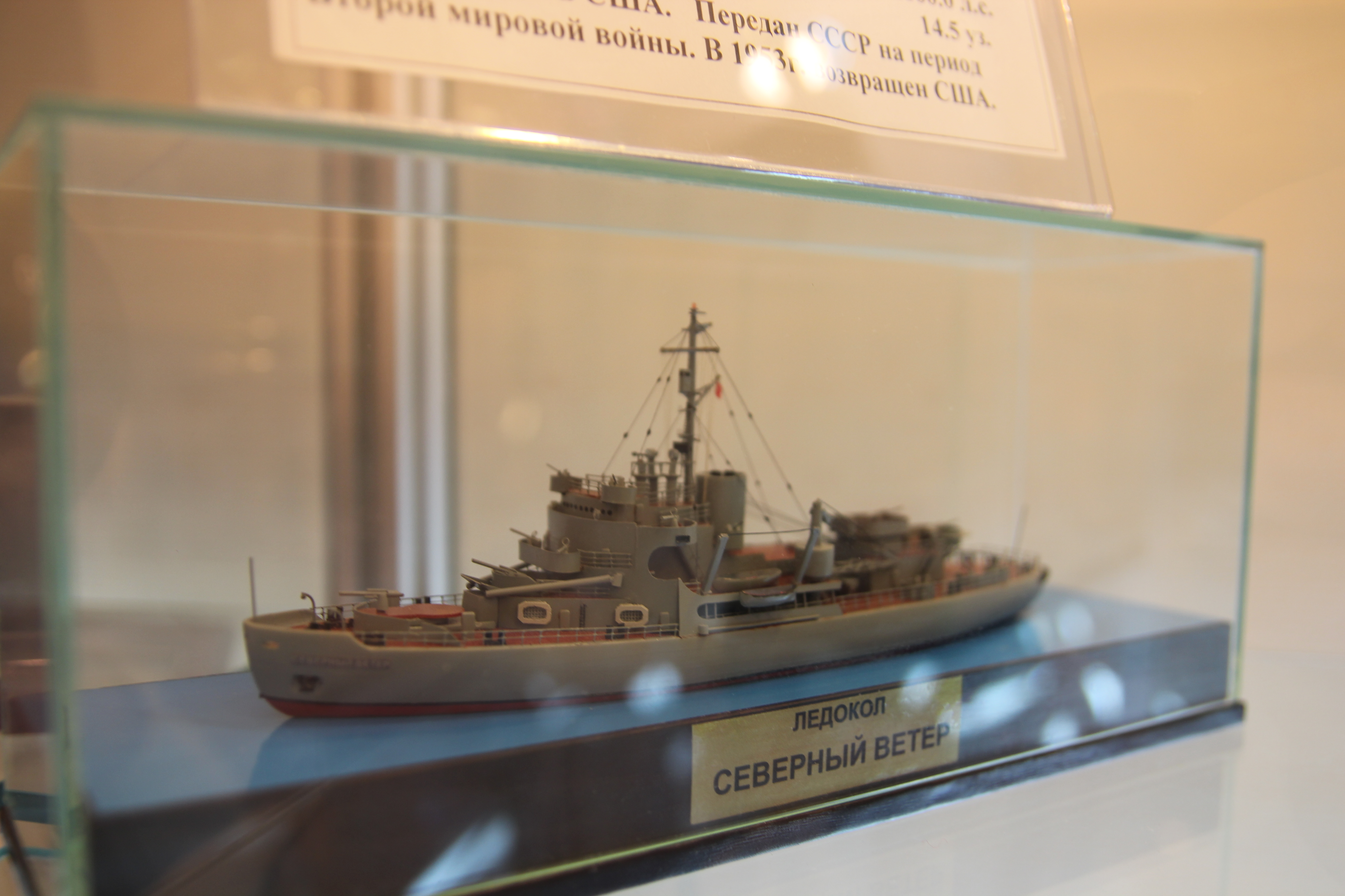 Модель судна Северный Ветер